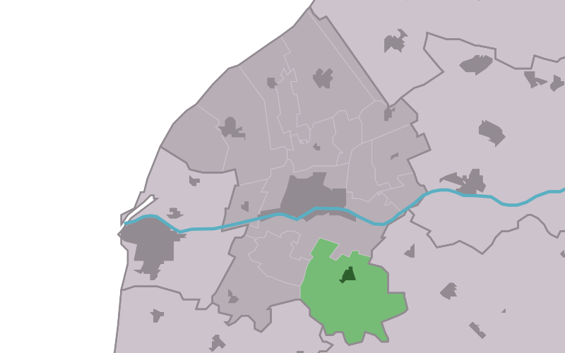 Kaartsje fan himrik fan Tsjom